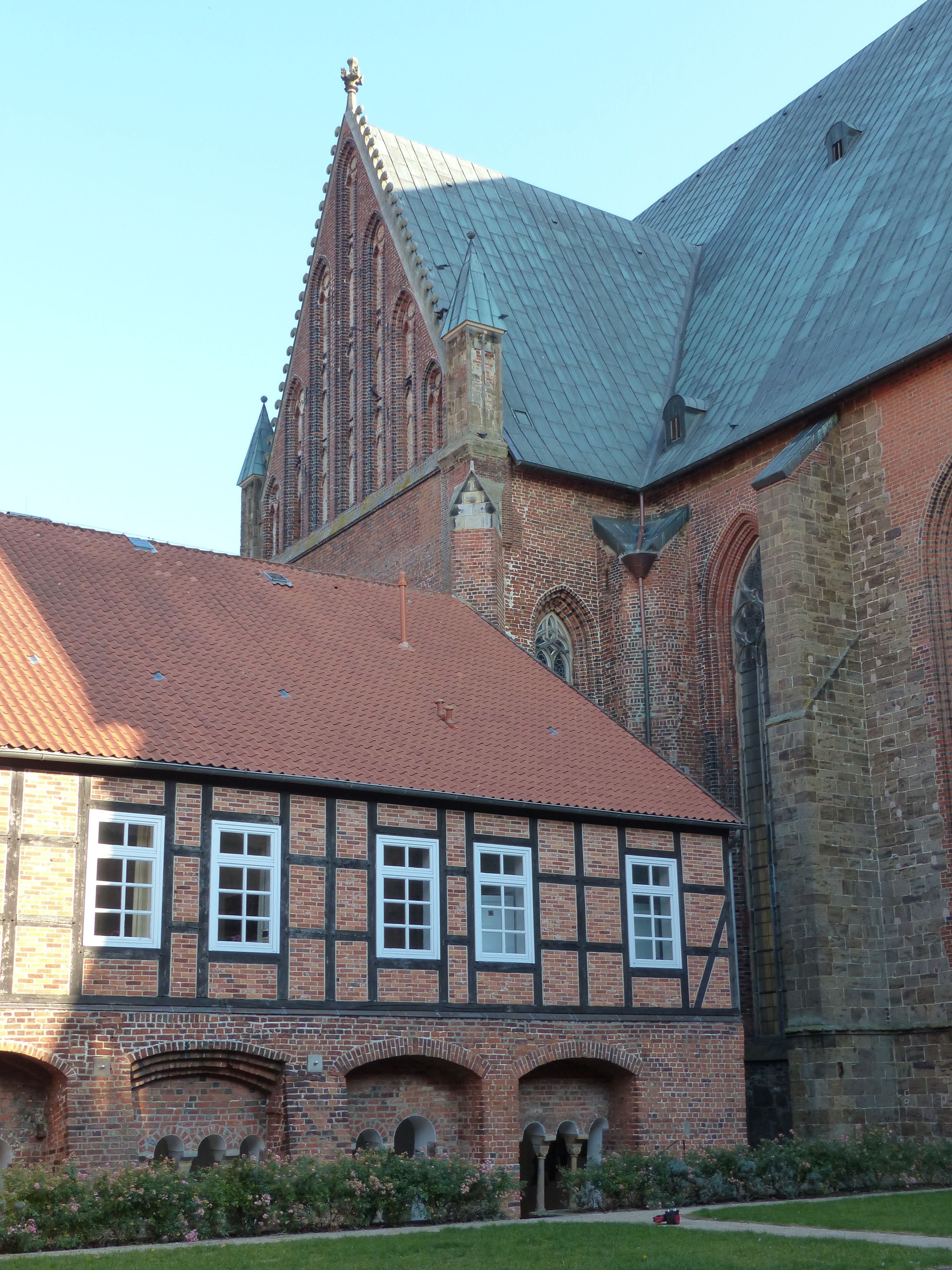 Verdener Dom, südliches Querhaus mit dem Hof der Domklausur